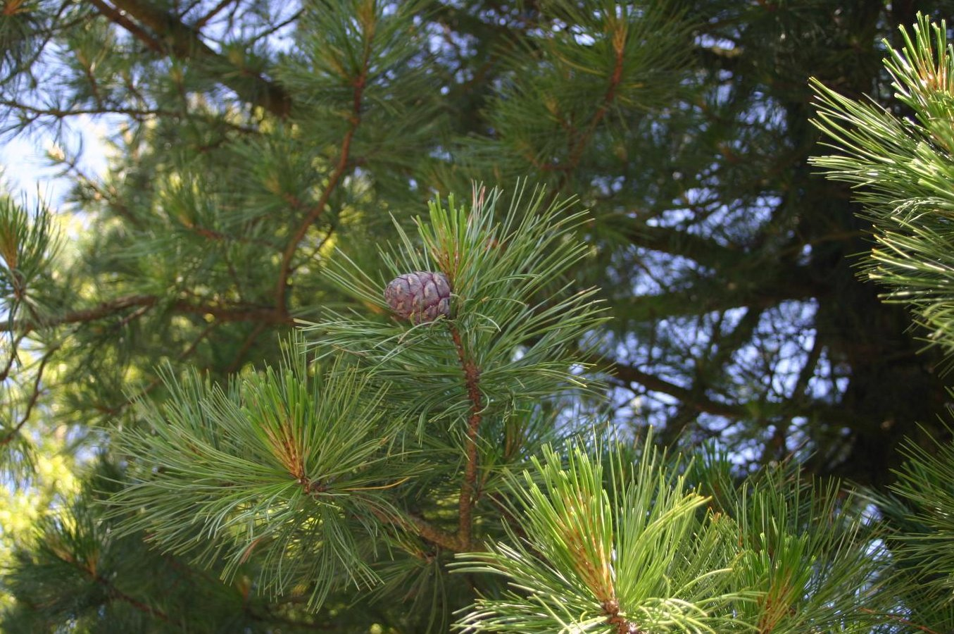 Pinus cembra: Cone